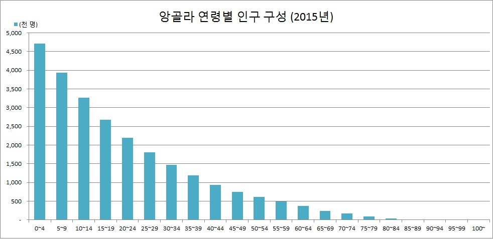 한국어 (조선): 앙골라 연령별 인구 구성 (2015년 UN 통계자료를 바탕으로 제작)